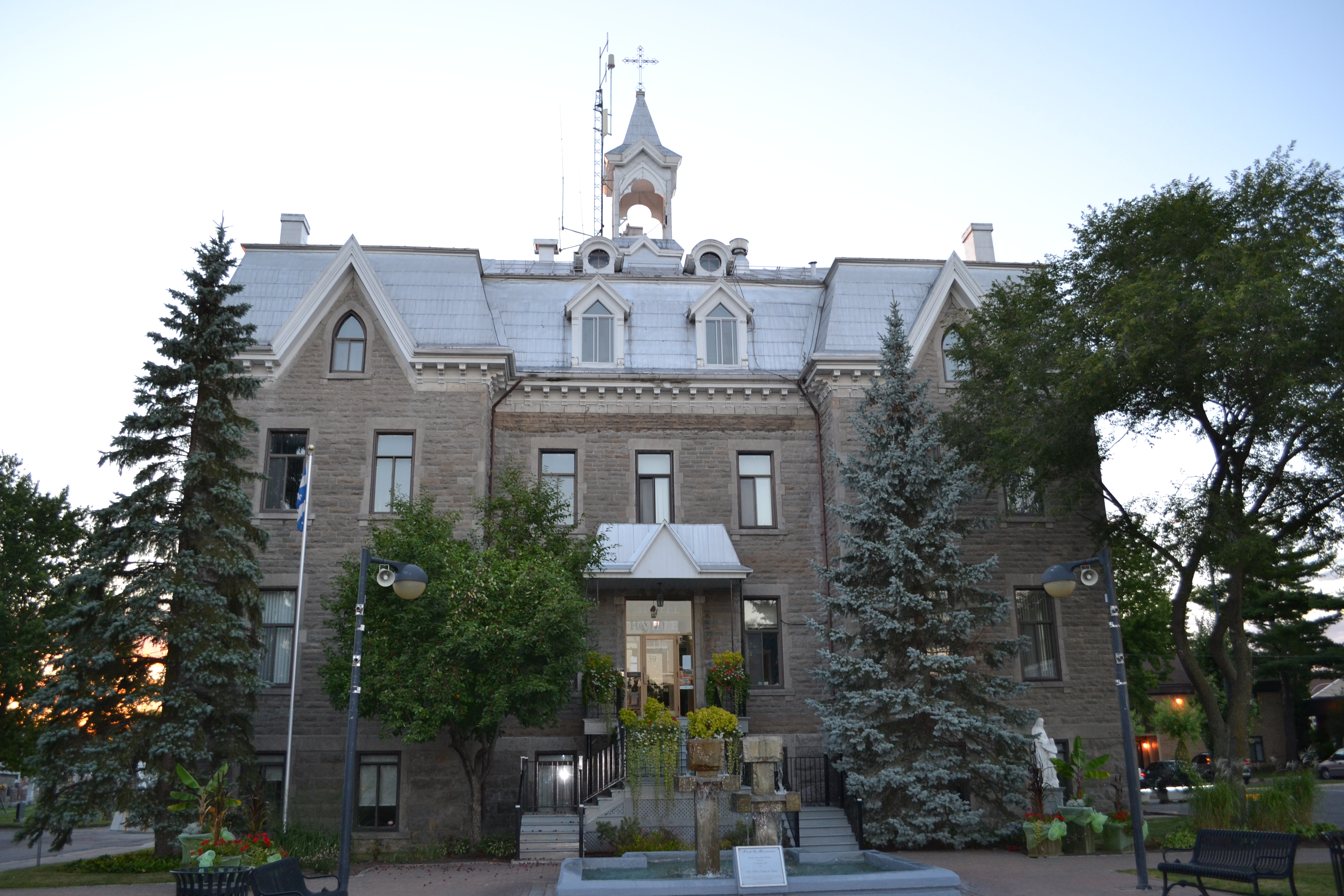 L'ancien couvent de Sainte-Anne-des-Plaines, Québec fut construit en 1882 et 1883.